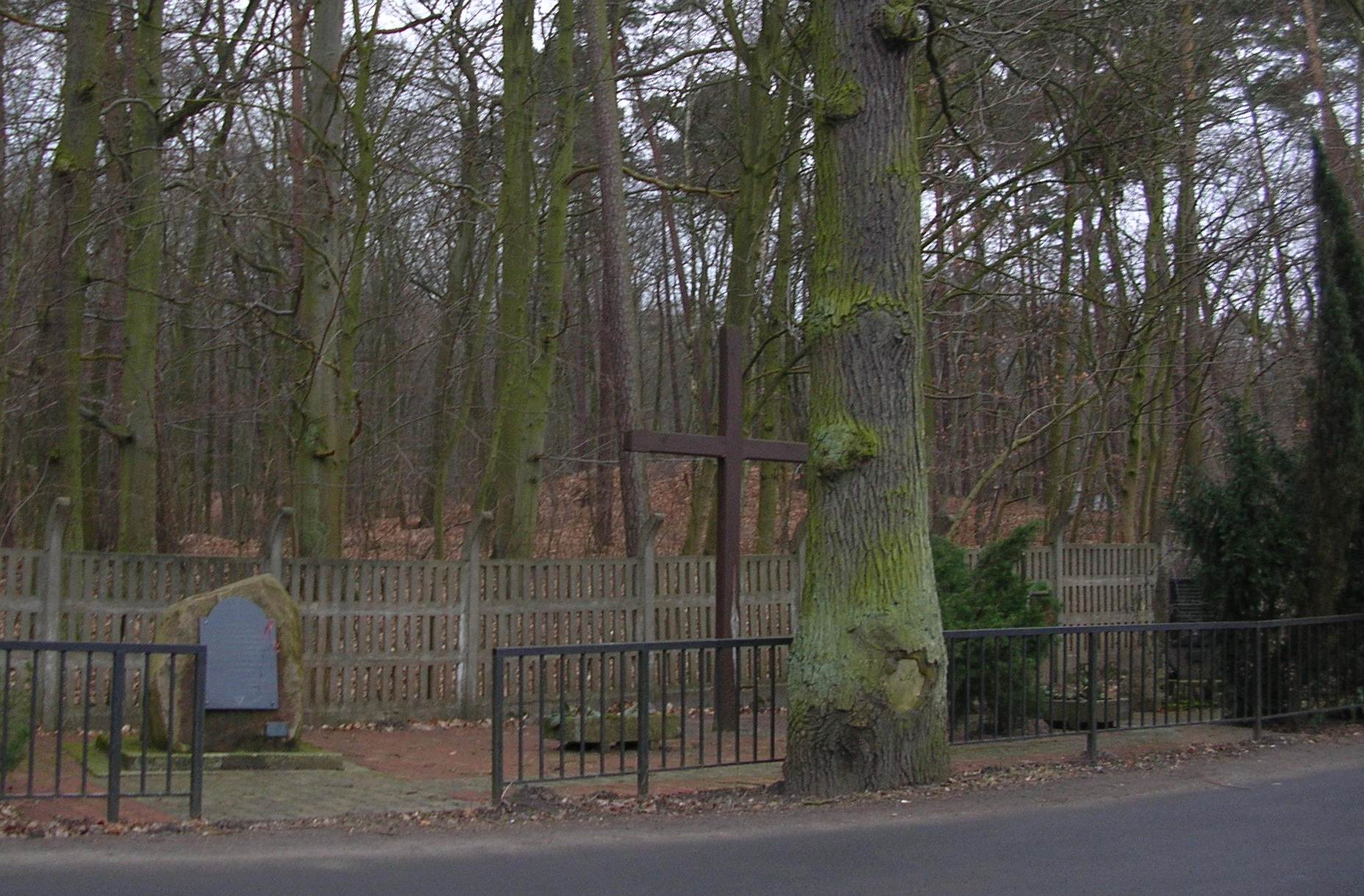 Monument in Police - Mścięcino, Pomerania, Poland / Pomnik przy ul. Ofiar Stutthofu w Policach - Mścięcinie